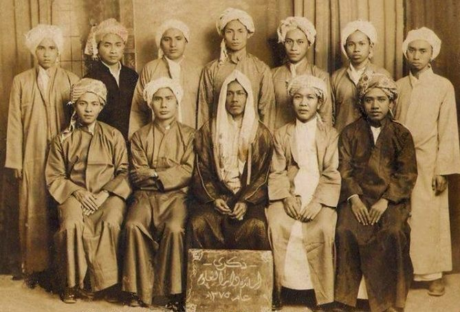 Para ulama Indonesia yang menjadi pengajar di Madrasah Darul Ulum Mekkah.